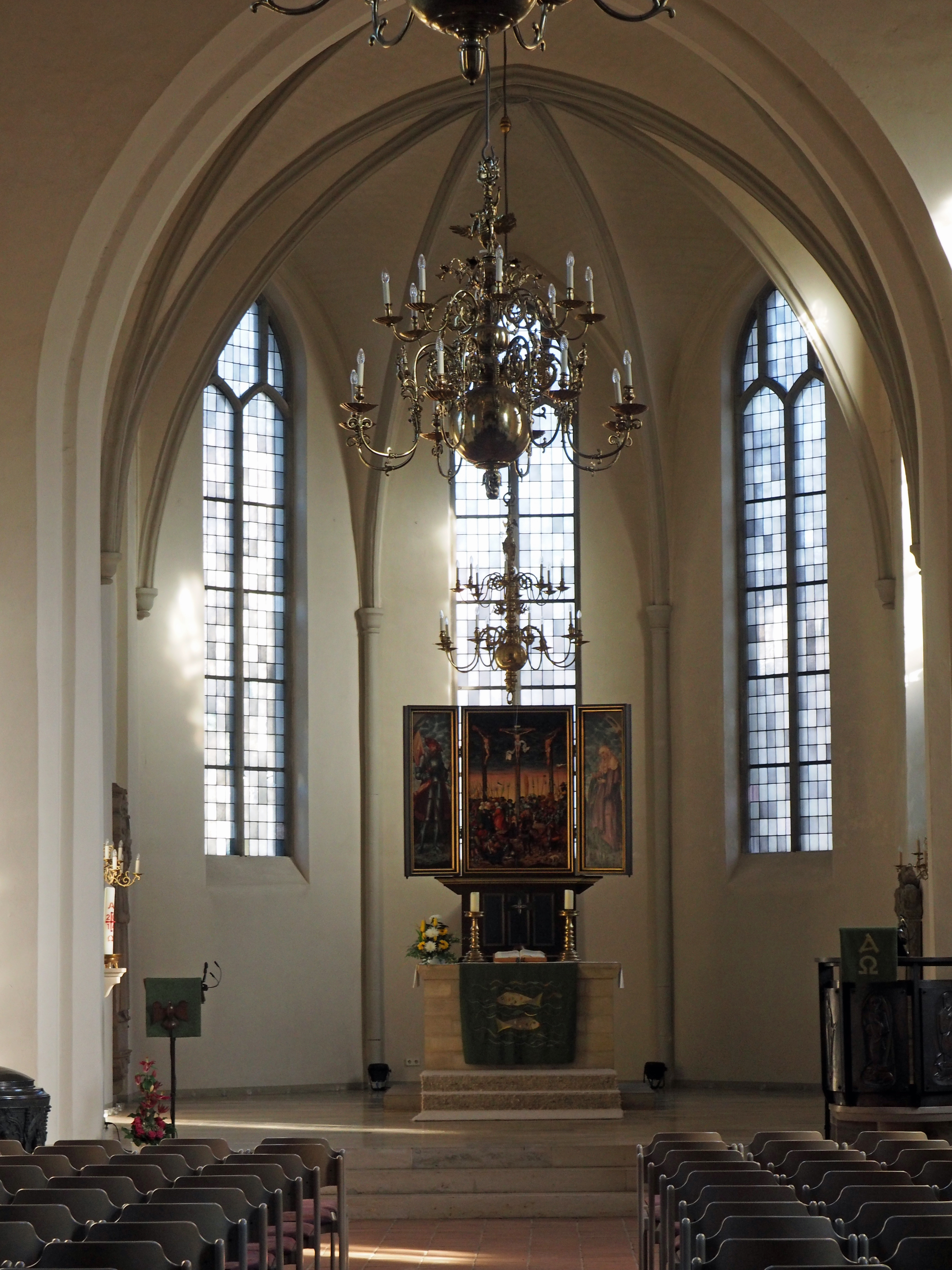 Innenraum mit Altar in der Schloss- und Stadtkirche St. Crucis (Hannover)